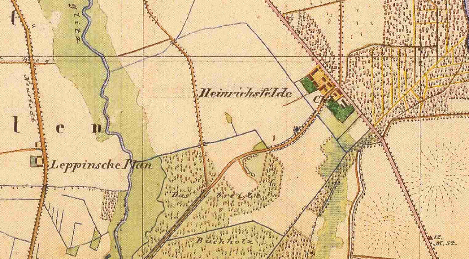 Heinrichsfelde, Wohnplatz der Stadt Kyritz, Lkr. Ostprignitz-Ruppin, Brandenburg, Ausschnitt auf dem Urmesstischblatt 3840 Kyritz von 1841